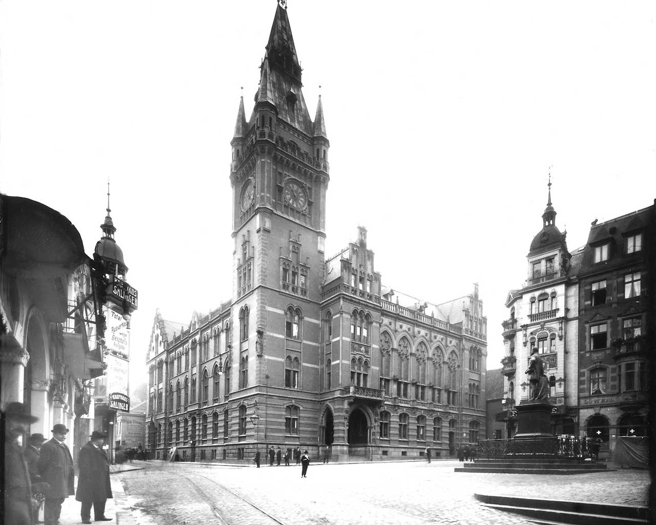 Essen, Rathaus, 1905